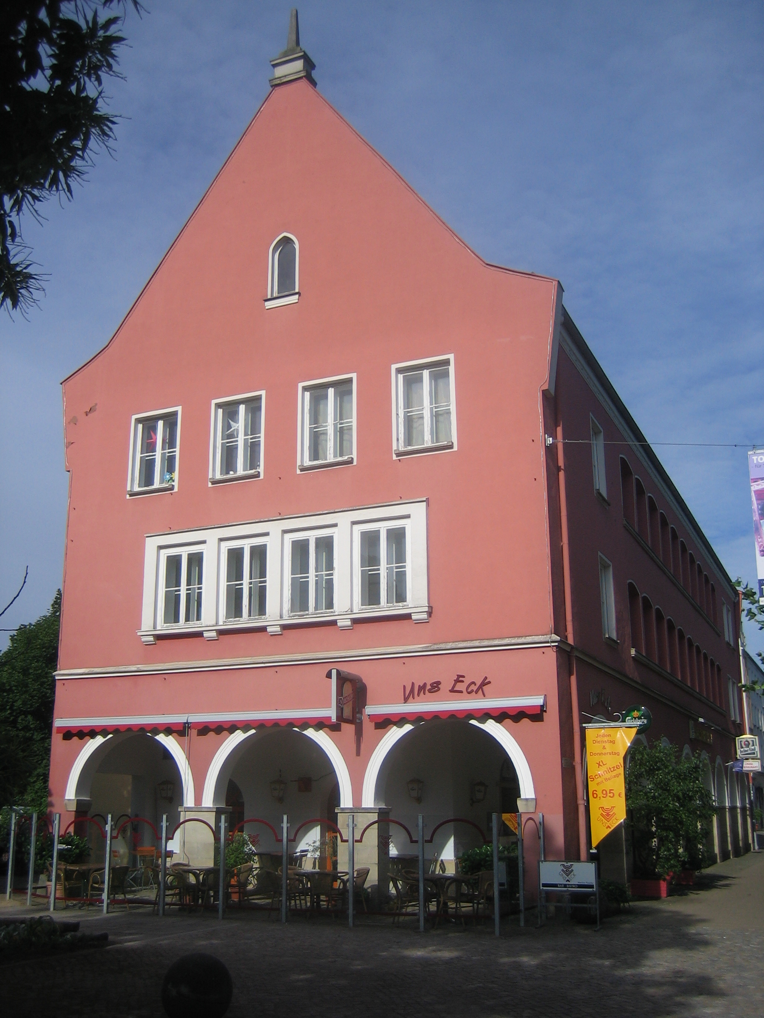 Wohnhaus und Gaststätte, Turmstraße 28, Neubrandenburg, Mecklenburg-Vorpommern